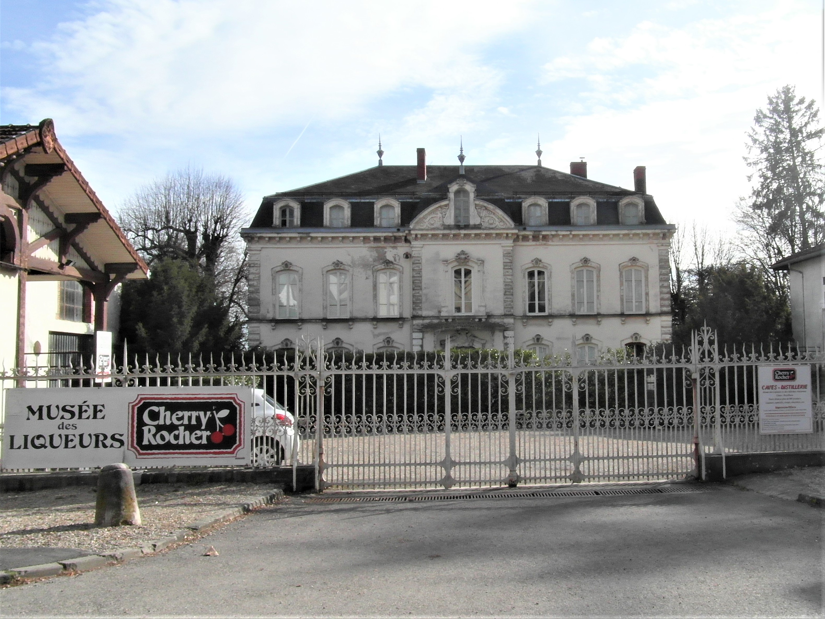 La Côte Saint-André musée des liqueurs en mars 2019